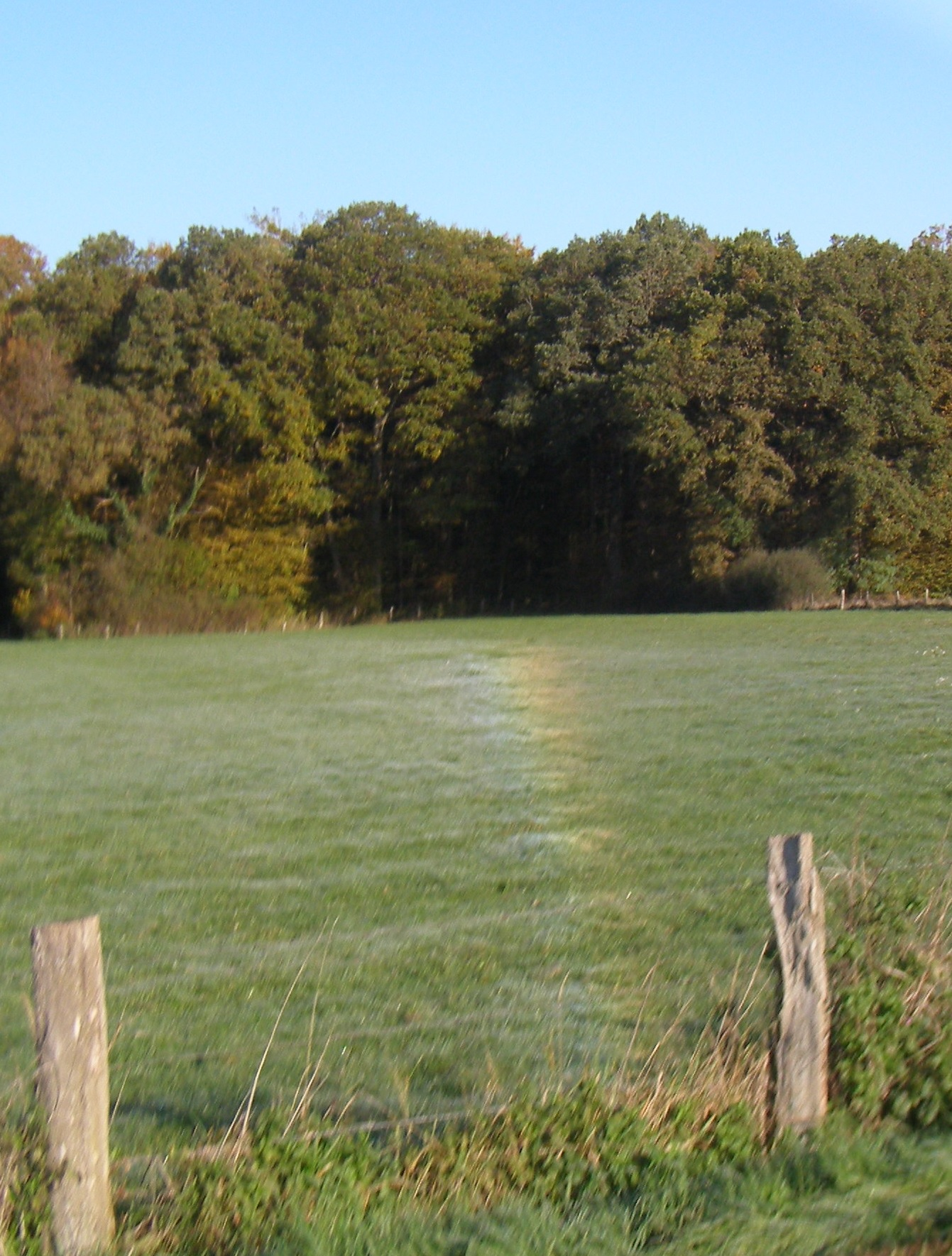 Arc en ciel de rosée sur une prairie des Vosges (France) photographié le 15 octobre 2017 avec un filtre polarisant